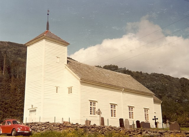 Vevring kirke